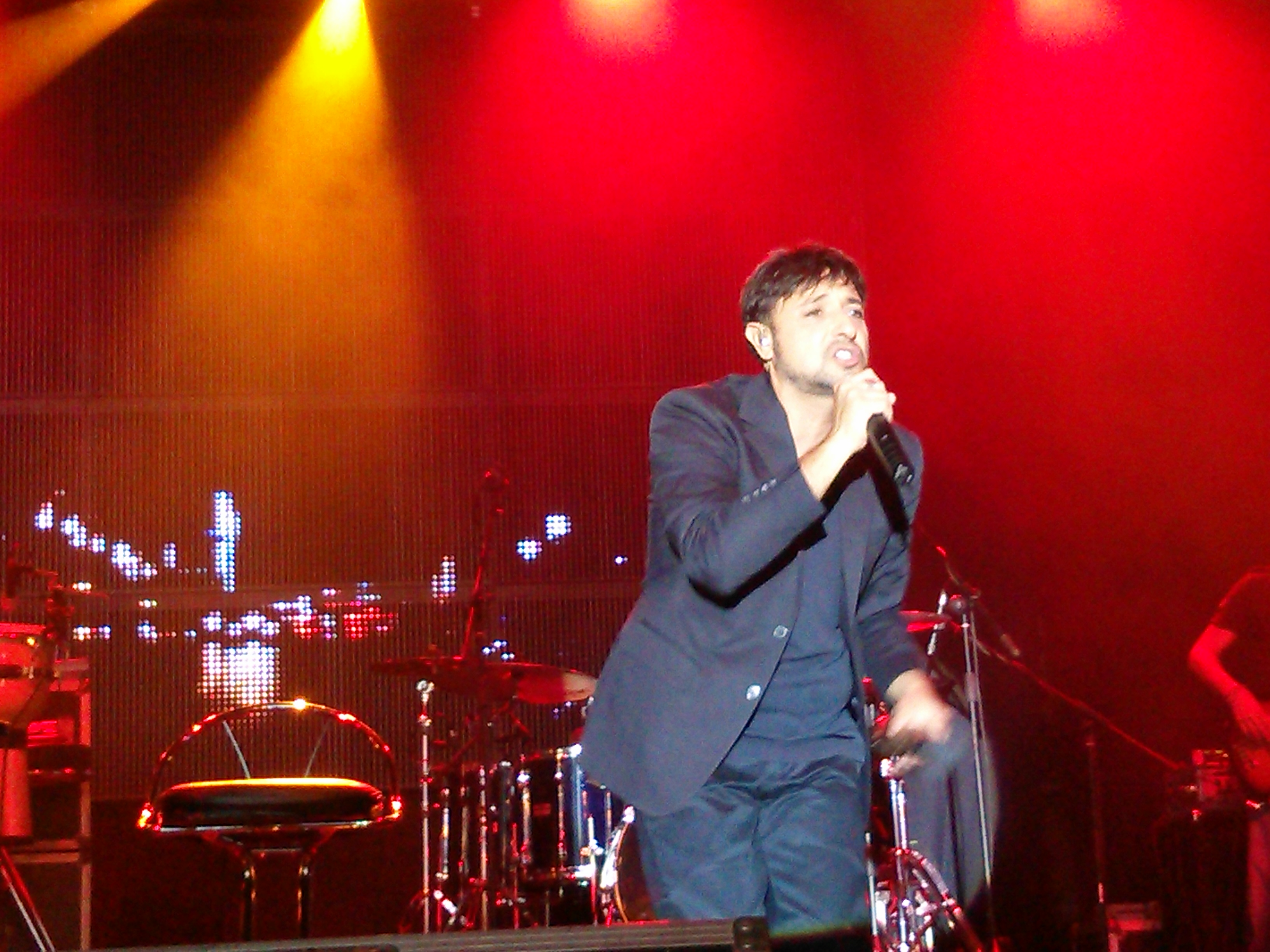 Gigi finizio San Valentino Torio